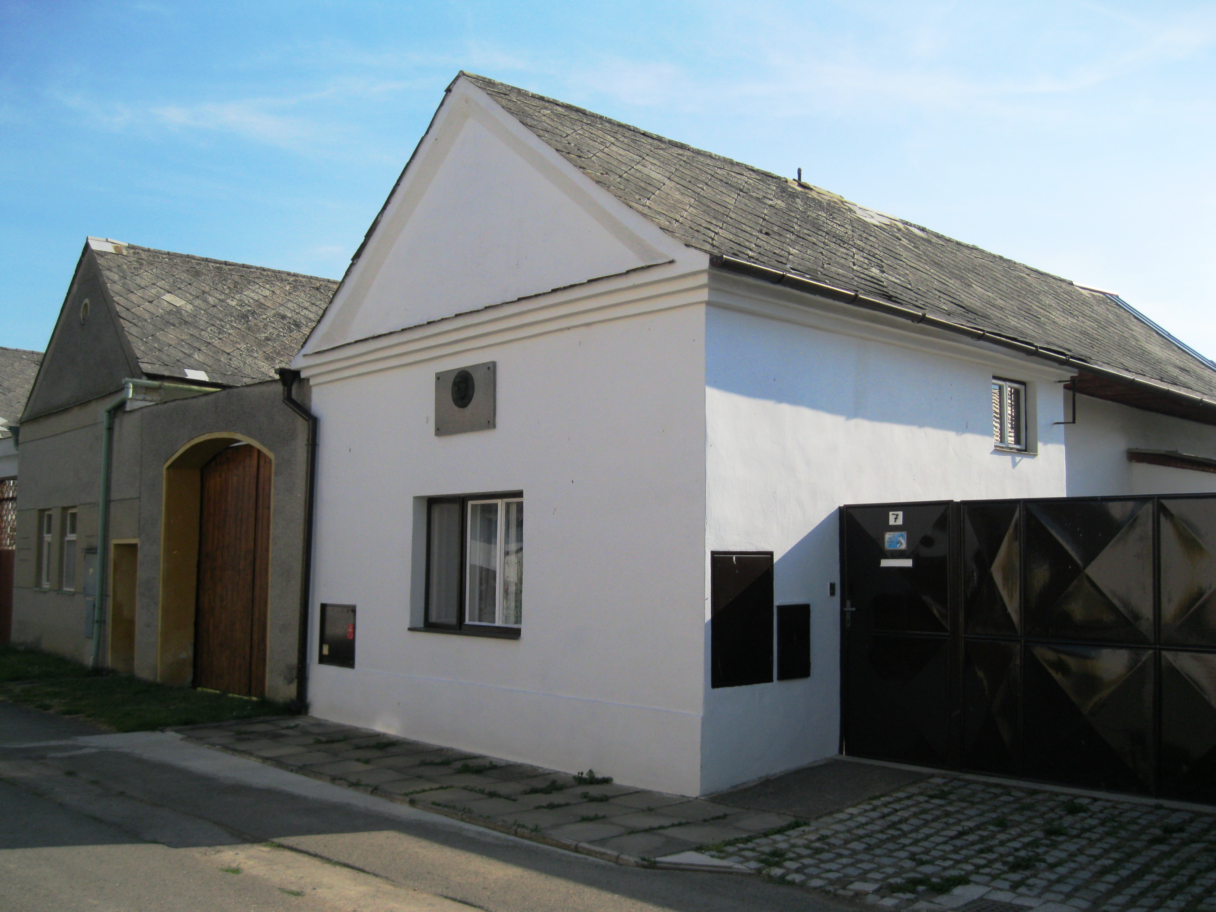 Venkovský dům s pamětní deskou F. Hrubého (Strukov), Strukov 7